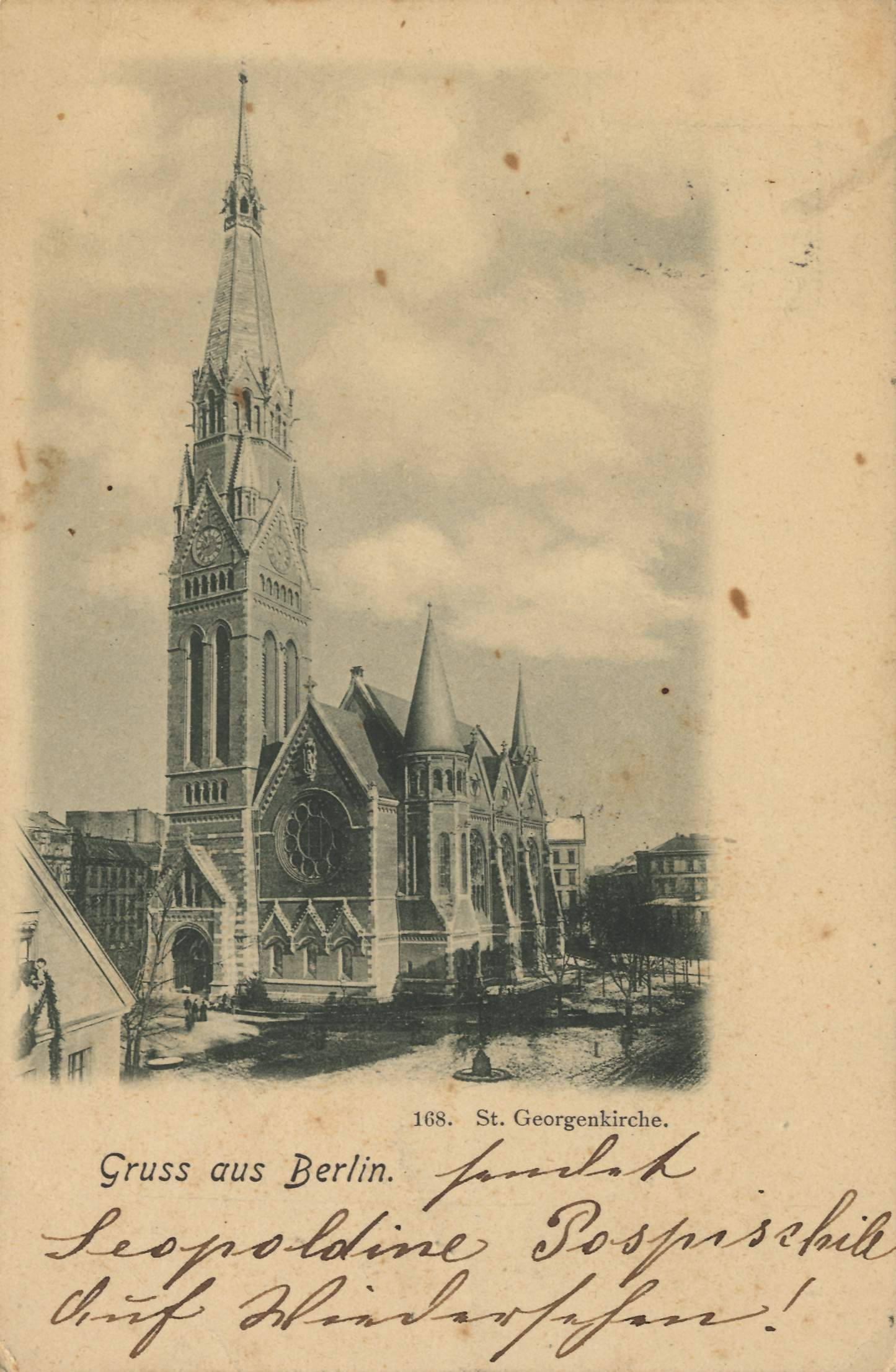 Georgenkirche (Berlin-Mitte)